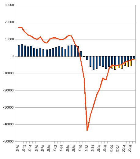 Eesti rahvaarvu muutus, 1970-2007 rahvaarvu muutus loomulik iive rändesaldo , andmed: Statistikaamet